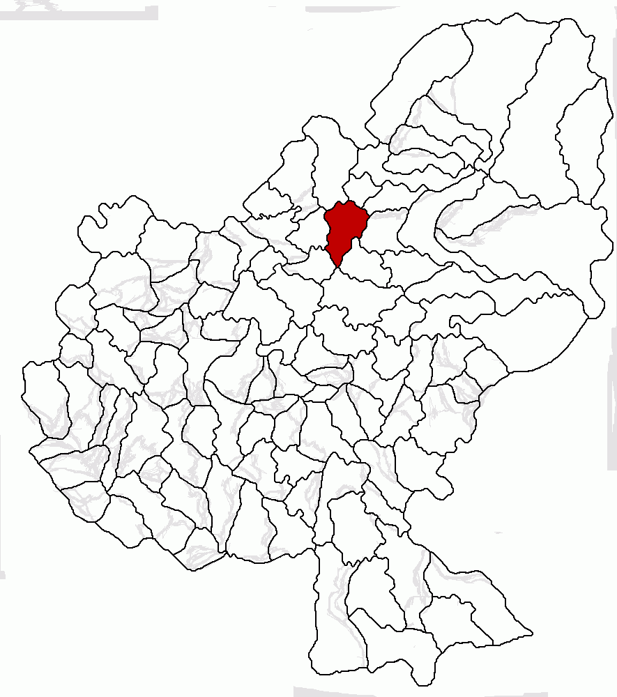 Categorie:Hărţi ale judeţului Mureş